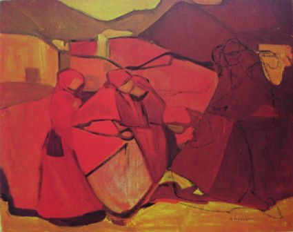 Komposition in Rot